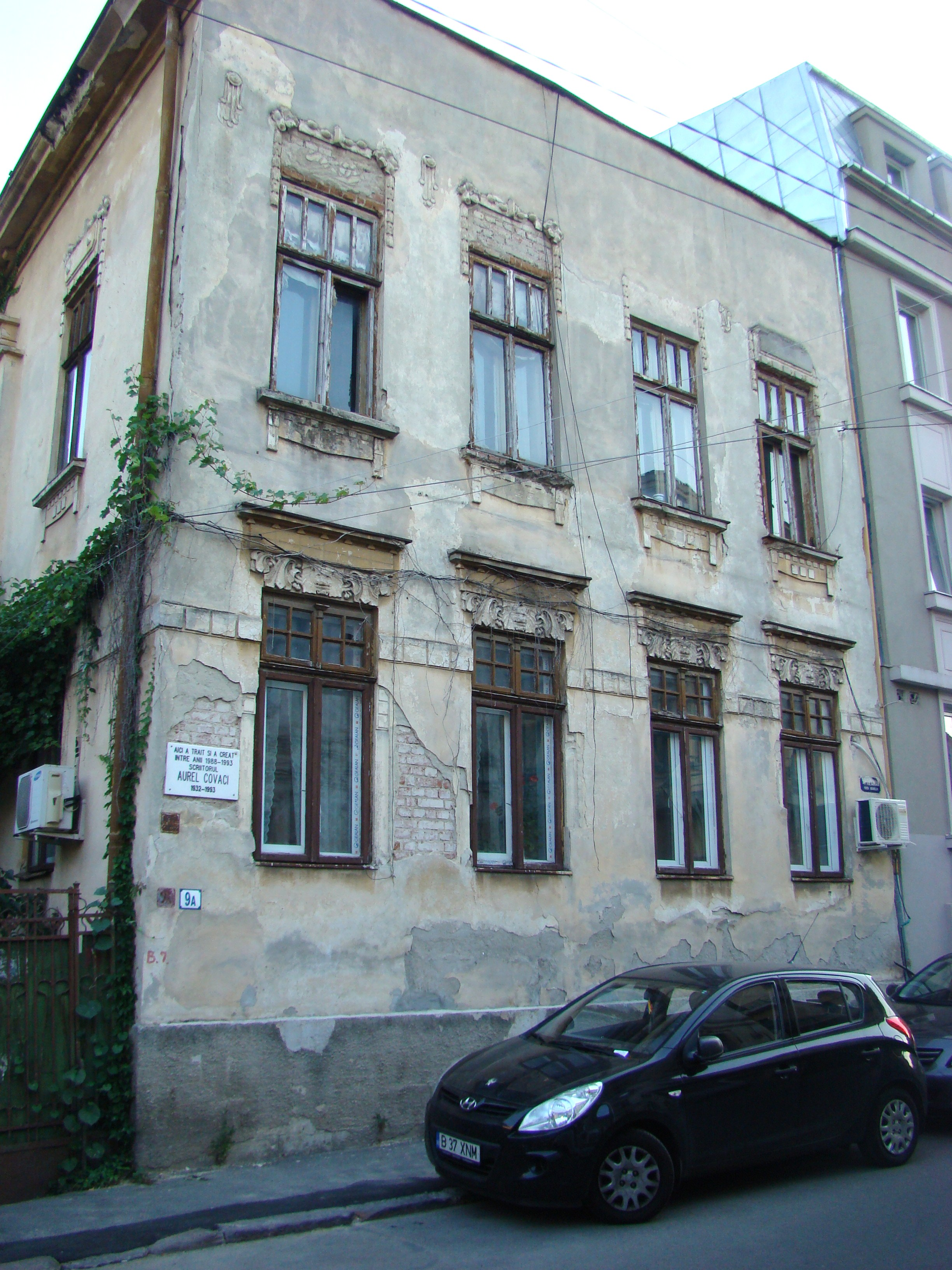 Casă monument istoric, str. Theodor Aman, nr.9A (Casa în care a trăit scriitorul și traducătorul Aurel Covaci)